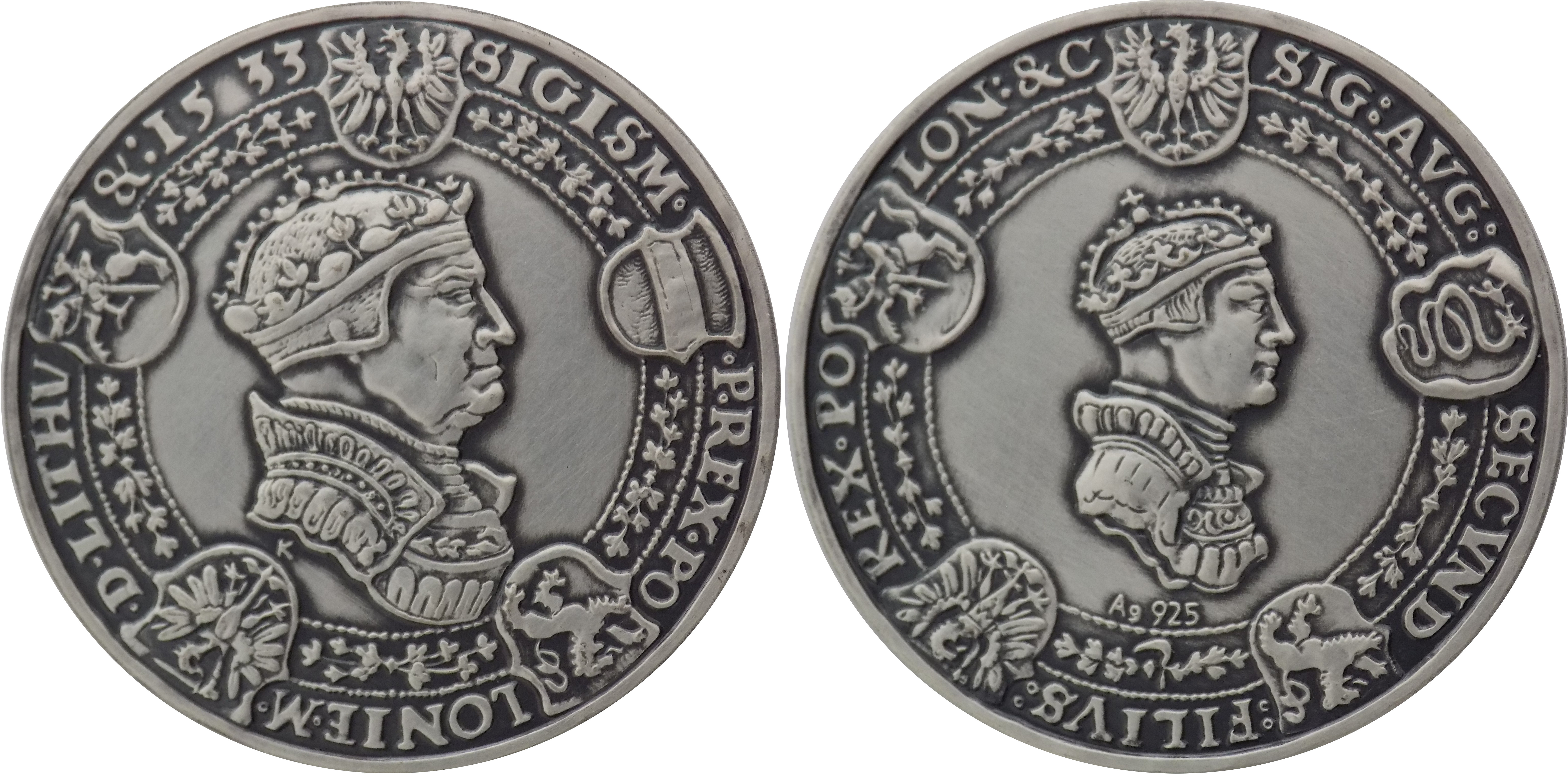 Replika talara koronnego 1533